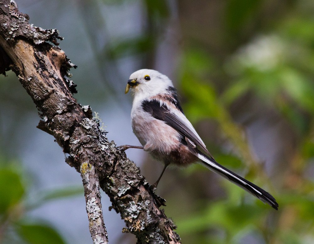 Пижемский заказник: от районного центра г. Шахунья на северо-восток в 24 км, от р. п. Вахтан на восток в 11 км,Тоншаевский район, Нижегородская область This image is related to the protected area of Russia number 5210571